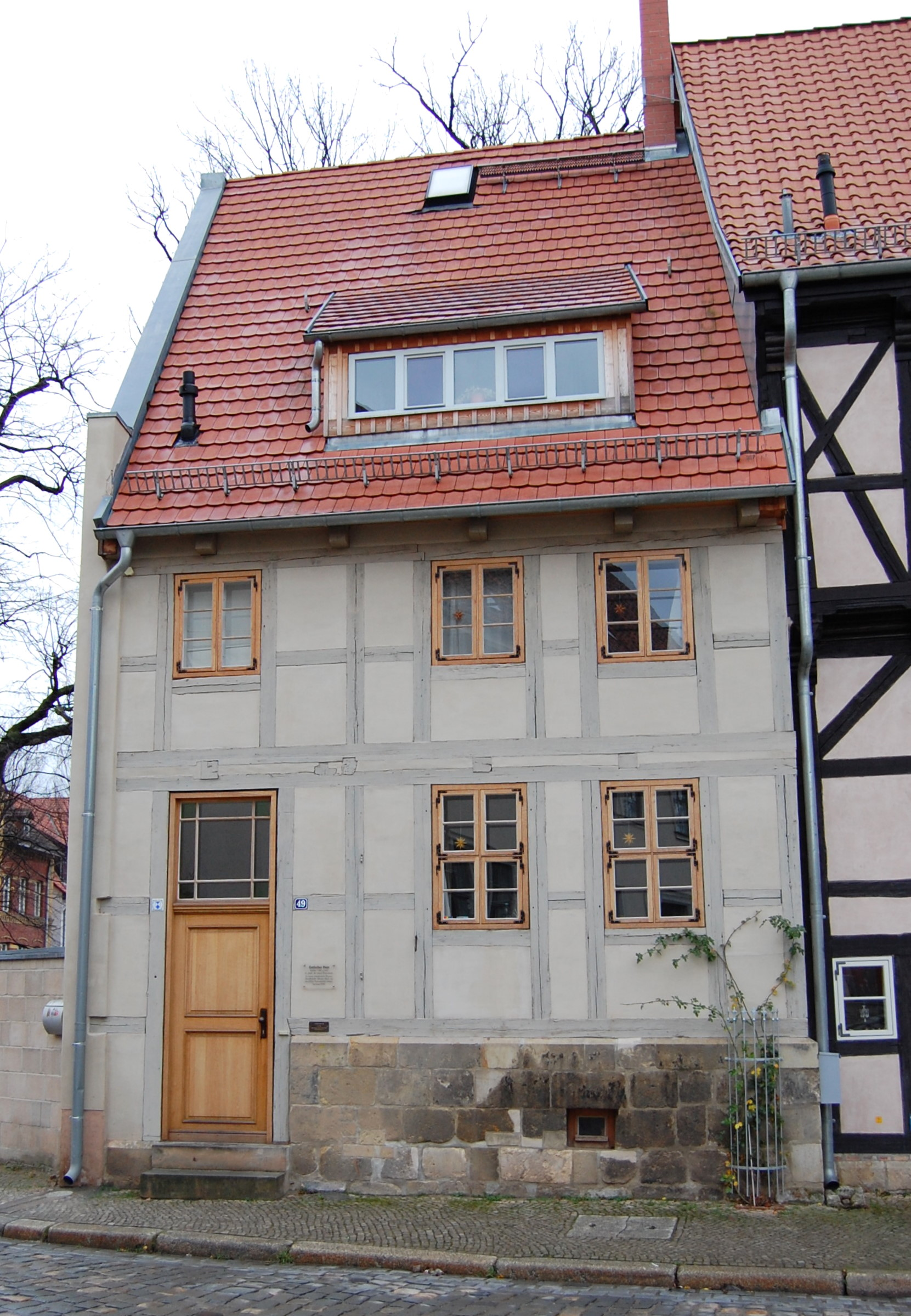 Quedlinburg Schmale Straße 49 in Quedlinburg, Gothisches Haus